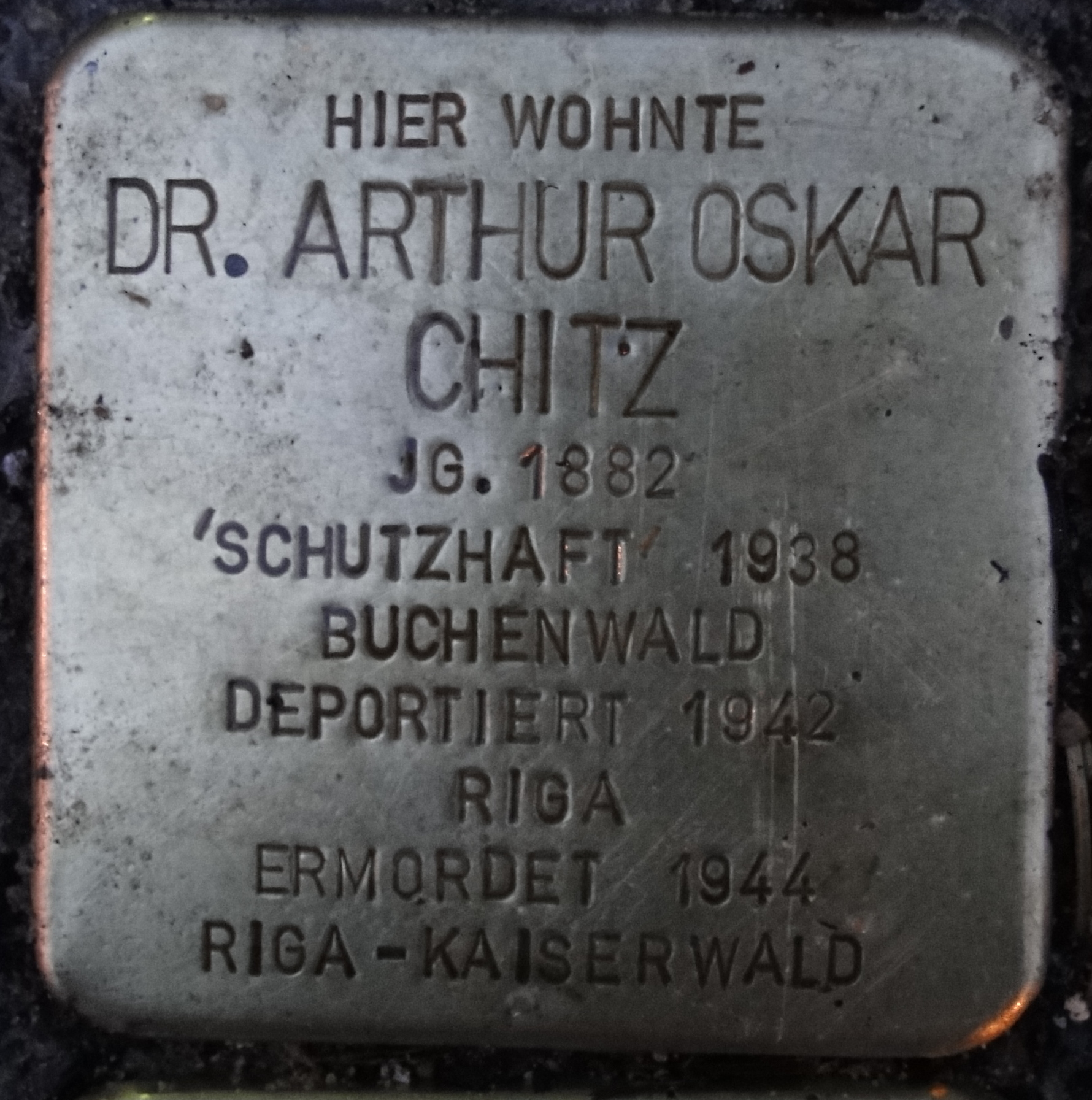 Stolperstein für Arthur Oskar Chitz in Dresden